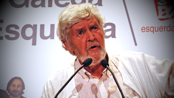 Xosé Manuel Beiras Torrado nun mitin en Ourense polas eleccións á Xunta de Galicia do ano 2012.